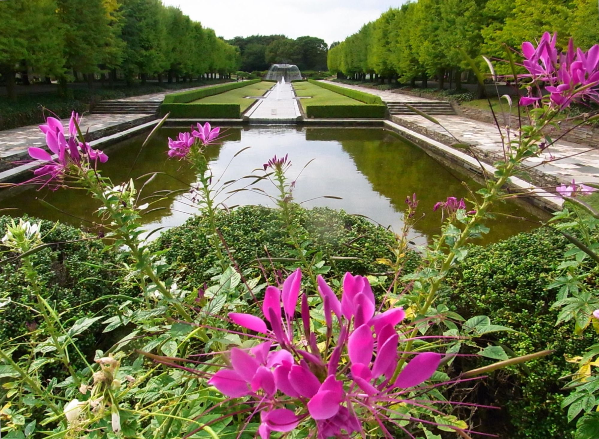 国営昭和記念公園